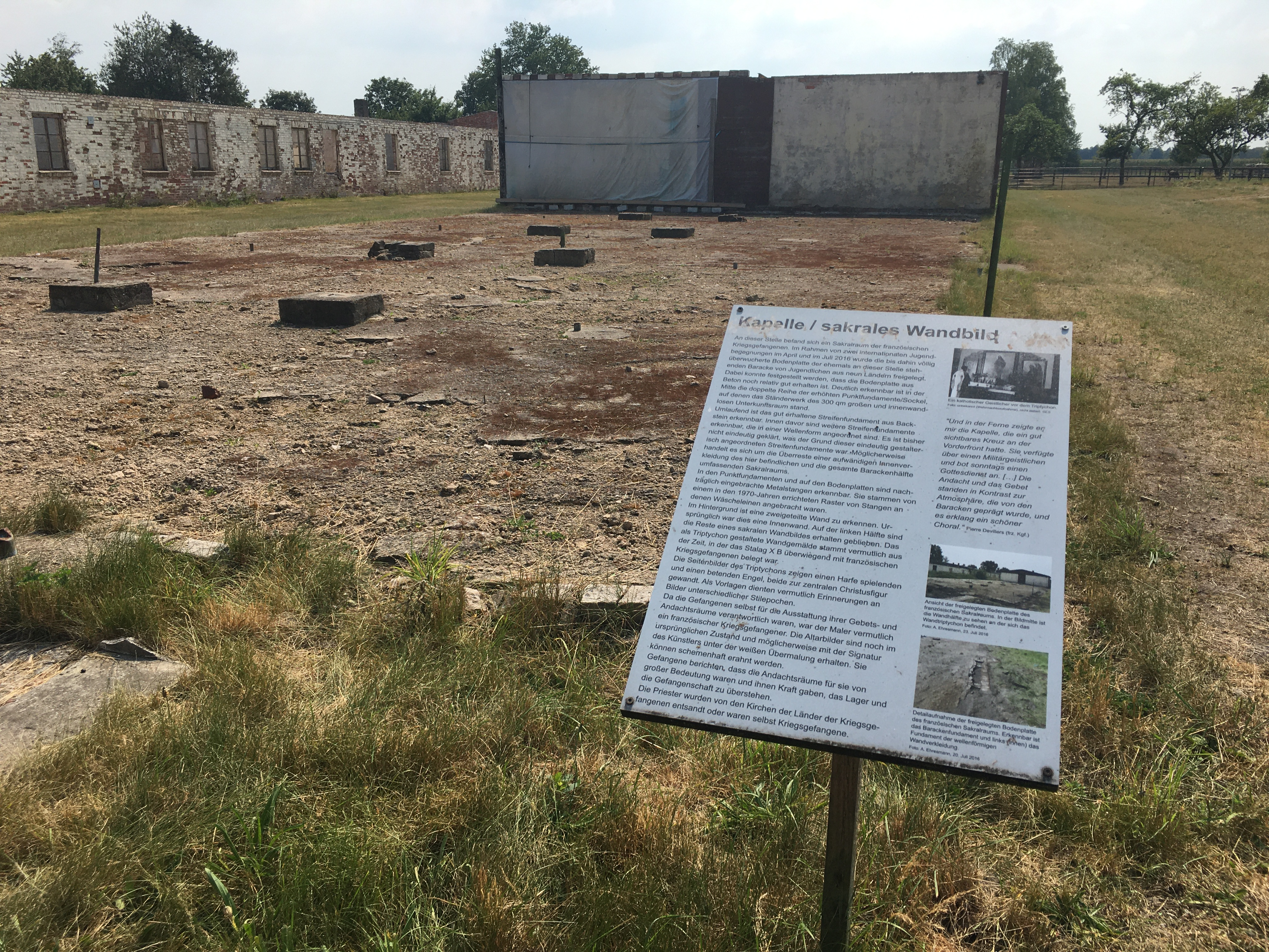 Hinter einer Plane verbirgt sich das übermalte Wandbild aus dem ehemaligen Andachtsraum französischer Kriegsgefangener. Eine Informationstafel informiert über das ehemalige Altarbild.